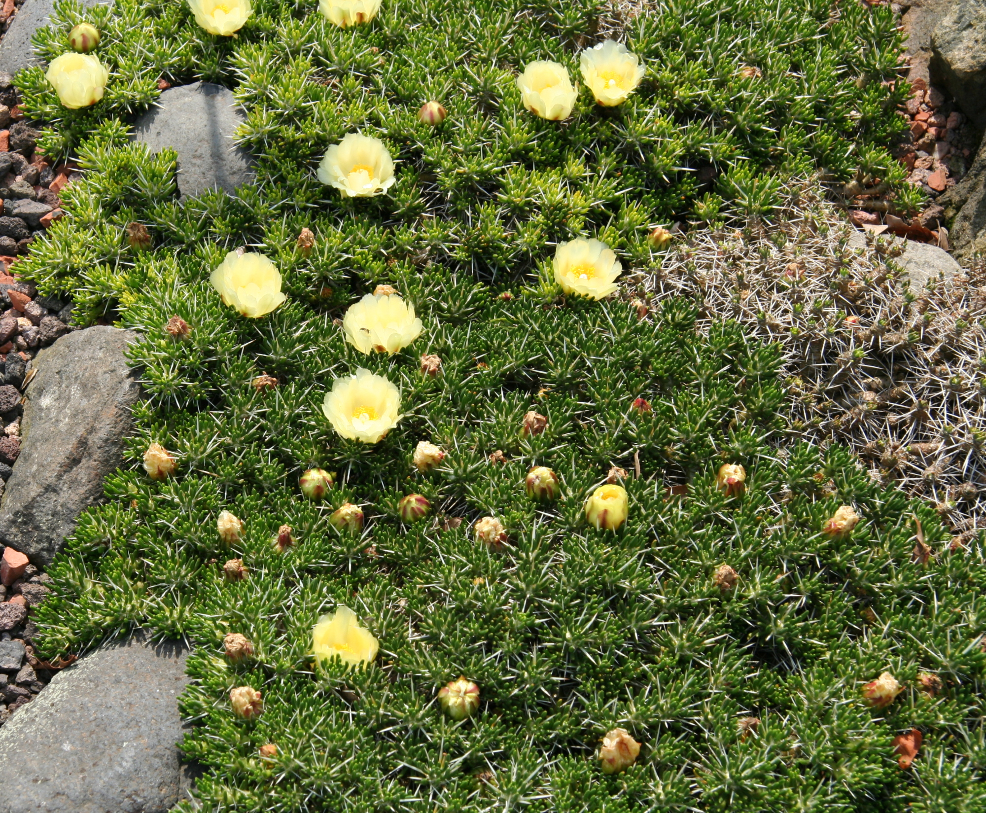 Maihuenia_poeppigii im Botanischen Garten Dresden